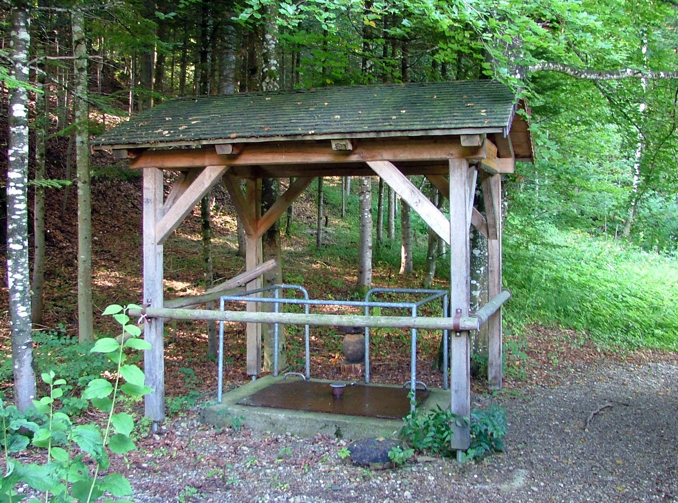 Römerquelle im Jobad Sulzbrunn